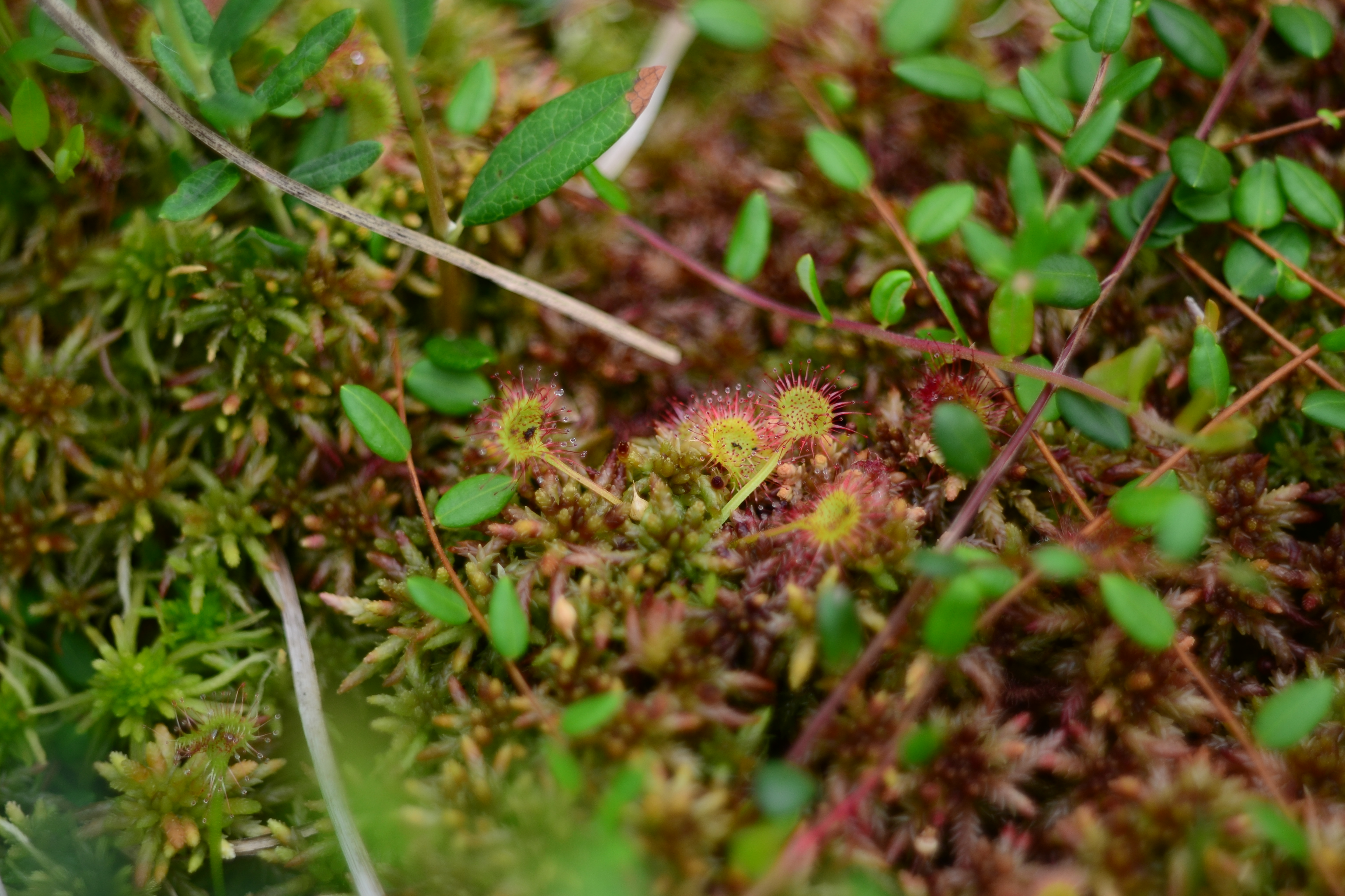 Rasica kruglalistaya